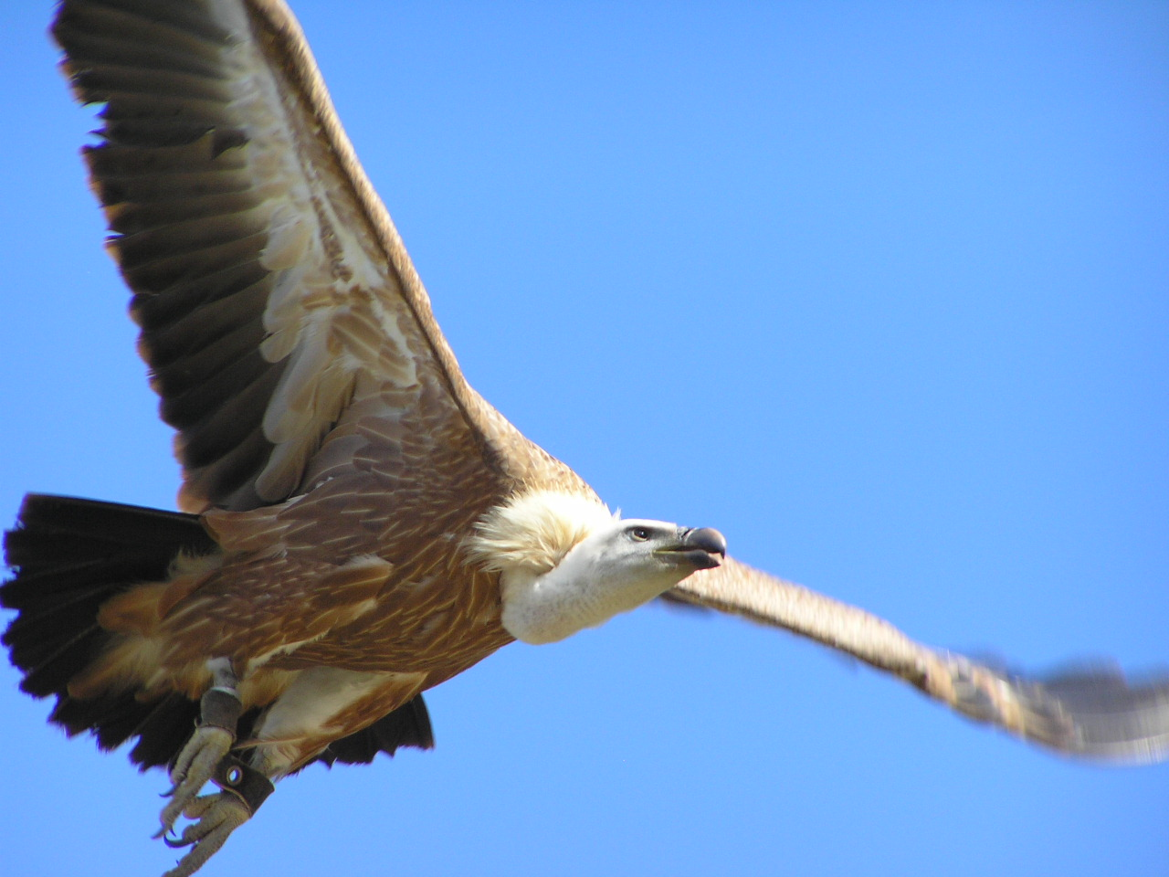 Vautour fauve (Gyps fulvus) au Zoo de la Flèche (Sarthe, France)